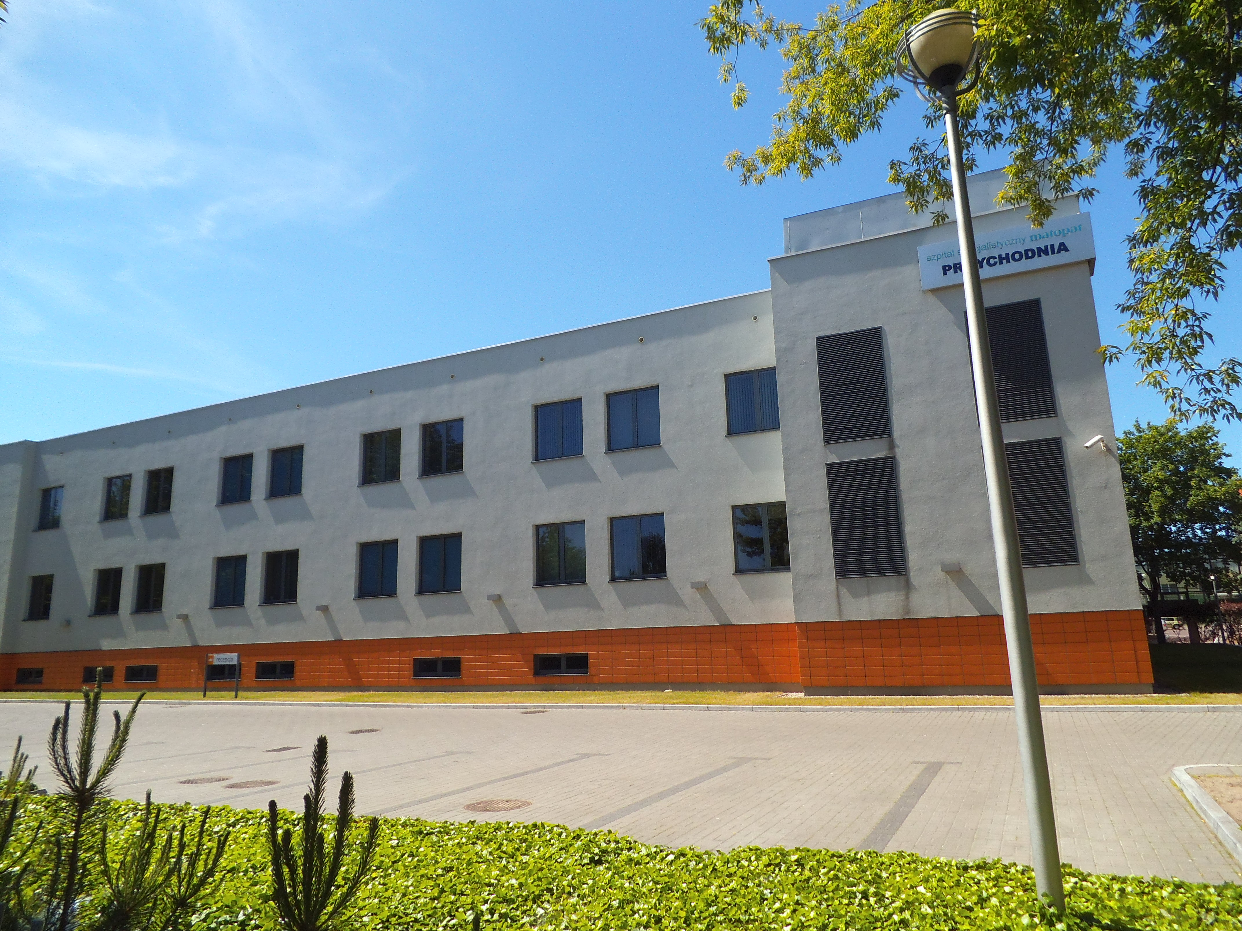 Przychodnia Szpitala Specjalistycznego Matopat w Toruniu